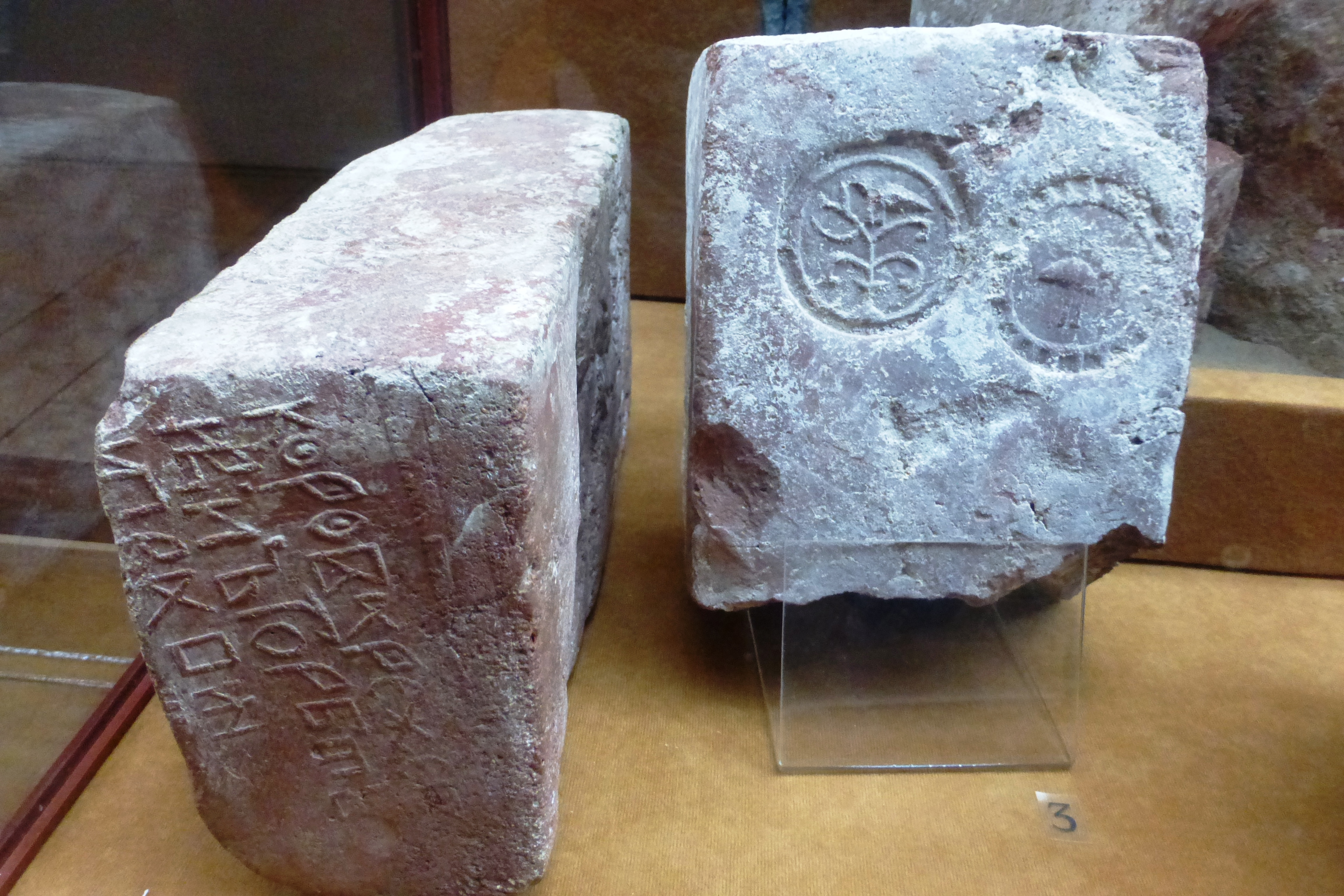 Образцы кирпичей в музейной экспозиции Соловецкого монастыря